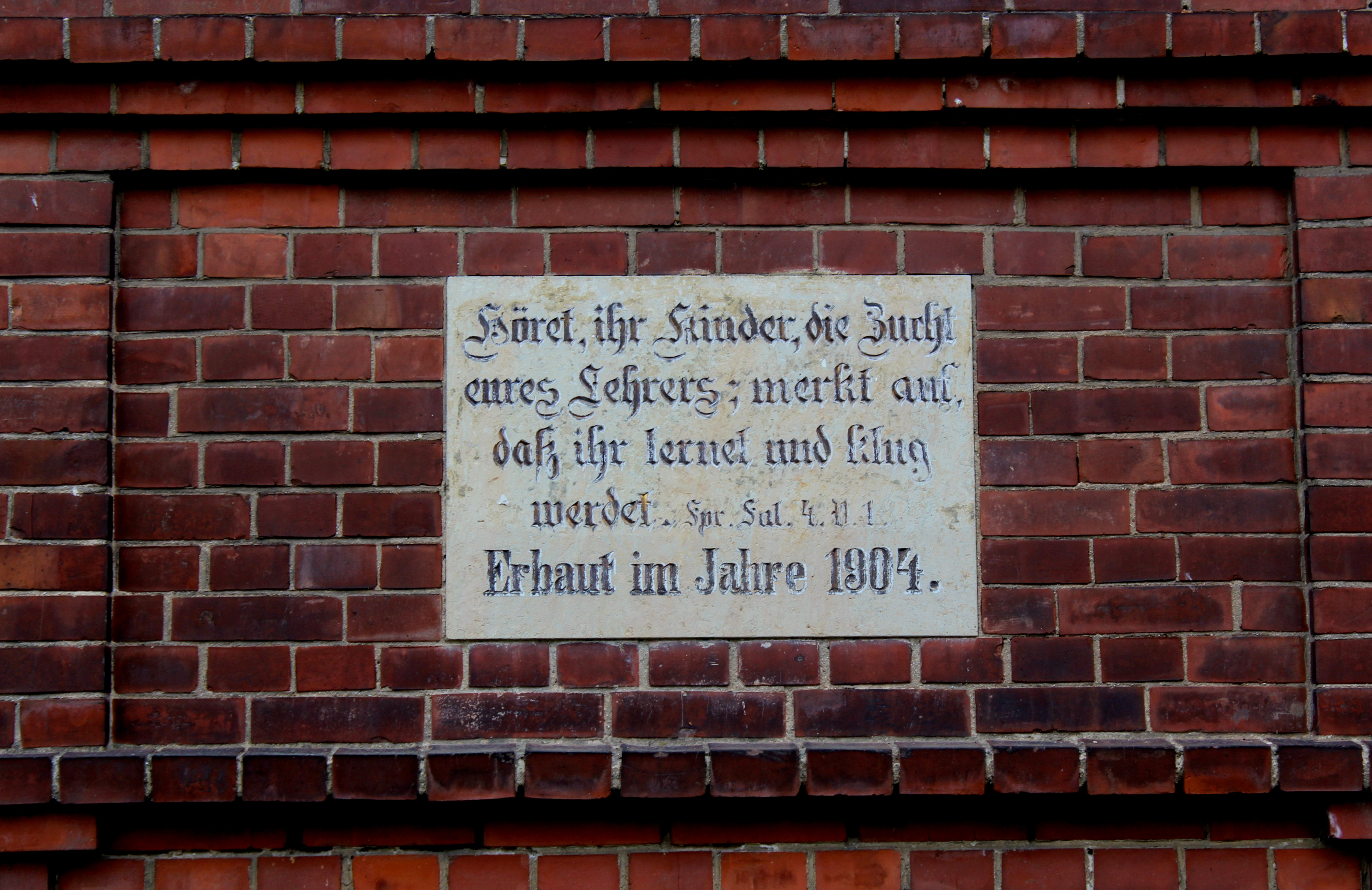 Inschrift an der unter Denkmalschutz stehenden alte Dorfschule von Zeischa.